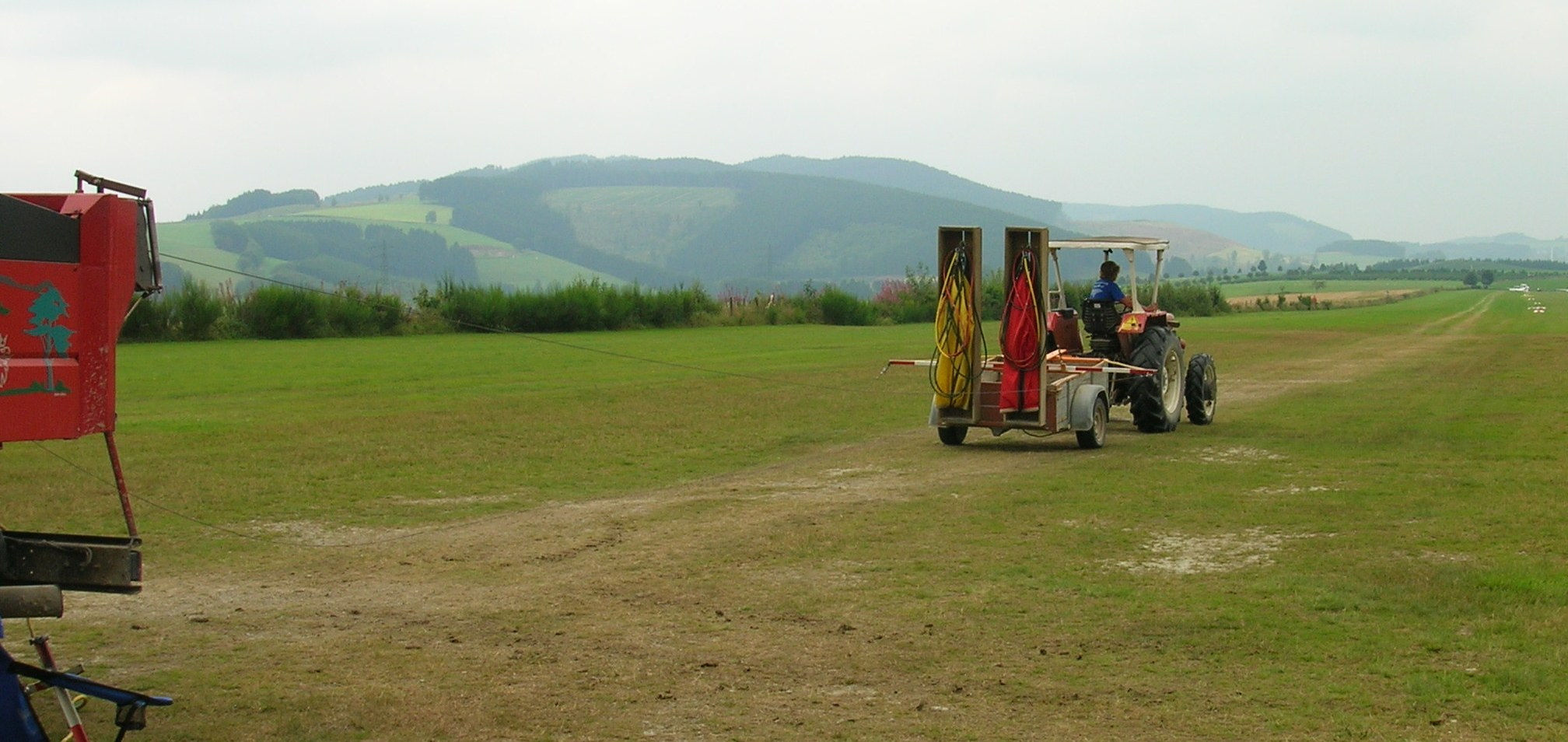 Lepo der Fluggemeinschaft Rennefeld e.V.: Fiat 540 SPECIAL DT vor einer Eigenbau-Konstruktion auf einem PKW-Anhänger